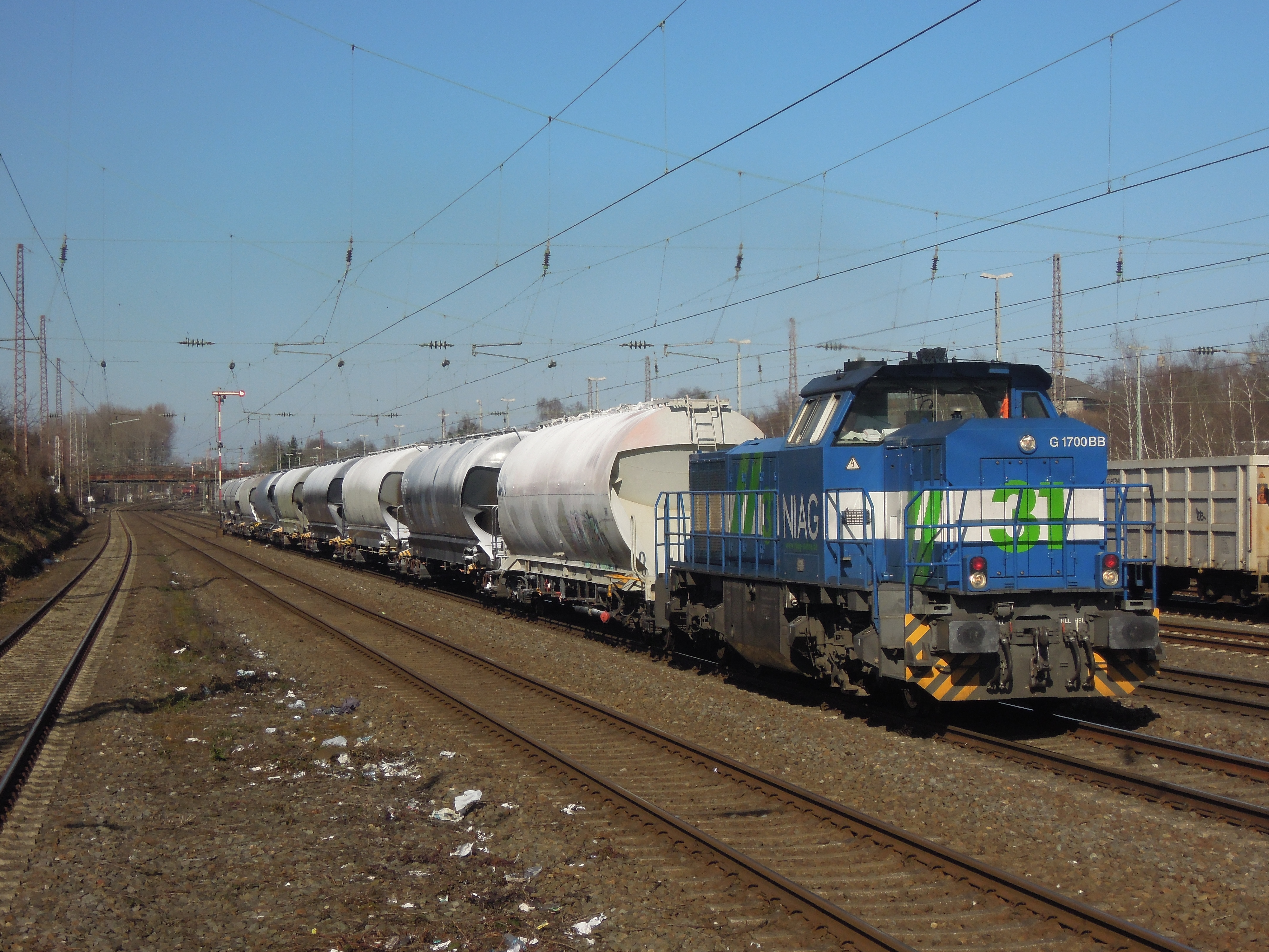 Lok 31 der NIAG in Düsseldorf-Rath, Fahrtrichtung Süden.